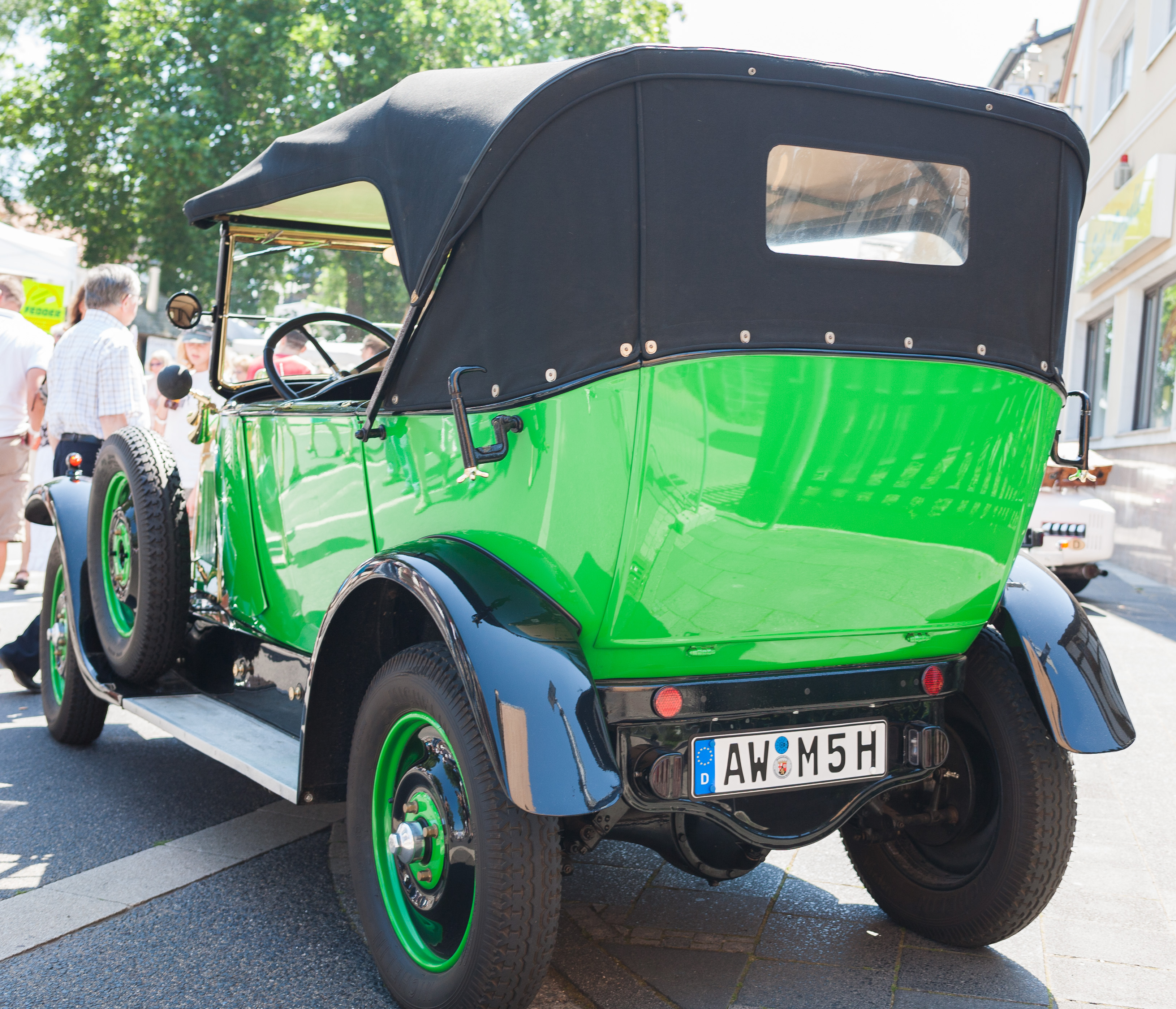 Rheinbach Classics 2007 – Heckansicht eines Citroën Typ A